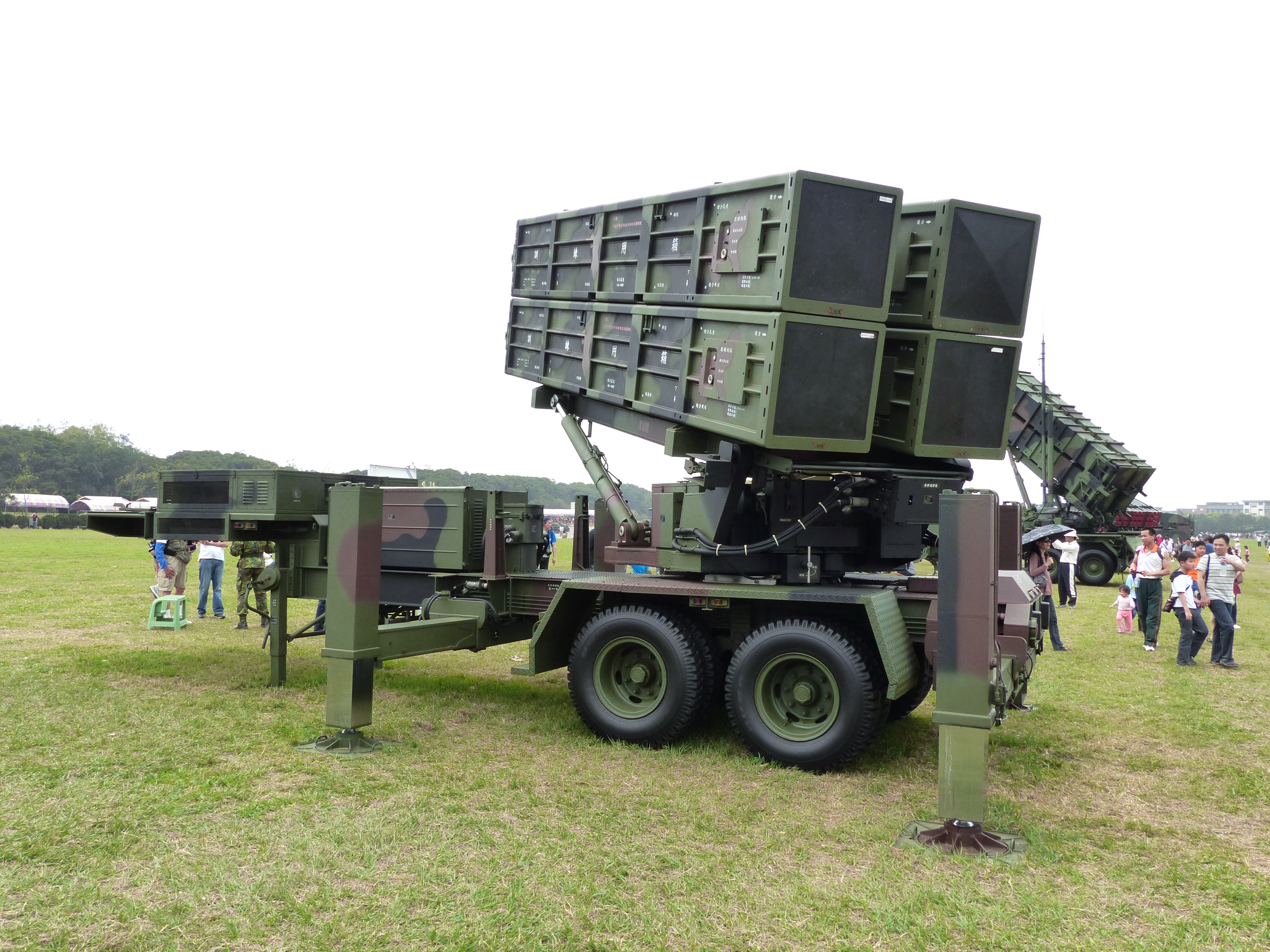 2014年陸軍湖口營區開放活動，操場展示的天弓二型防空飛彈發射車左側，後方是愛國者二型飛彈發射車。